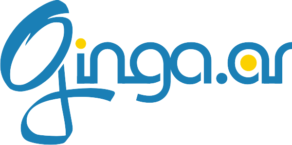 Logo de Ginga.ar 2012 - LIFIA - Facultad de Informática - Universidad Nacional de La Plata.